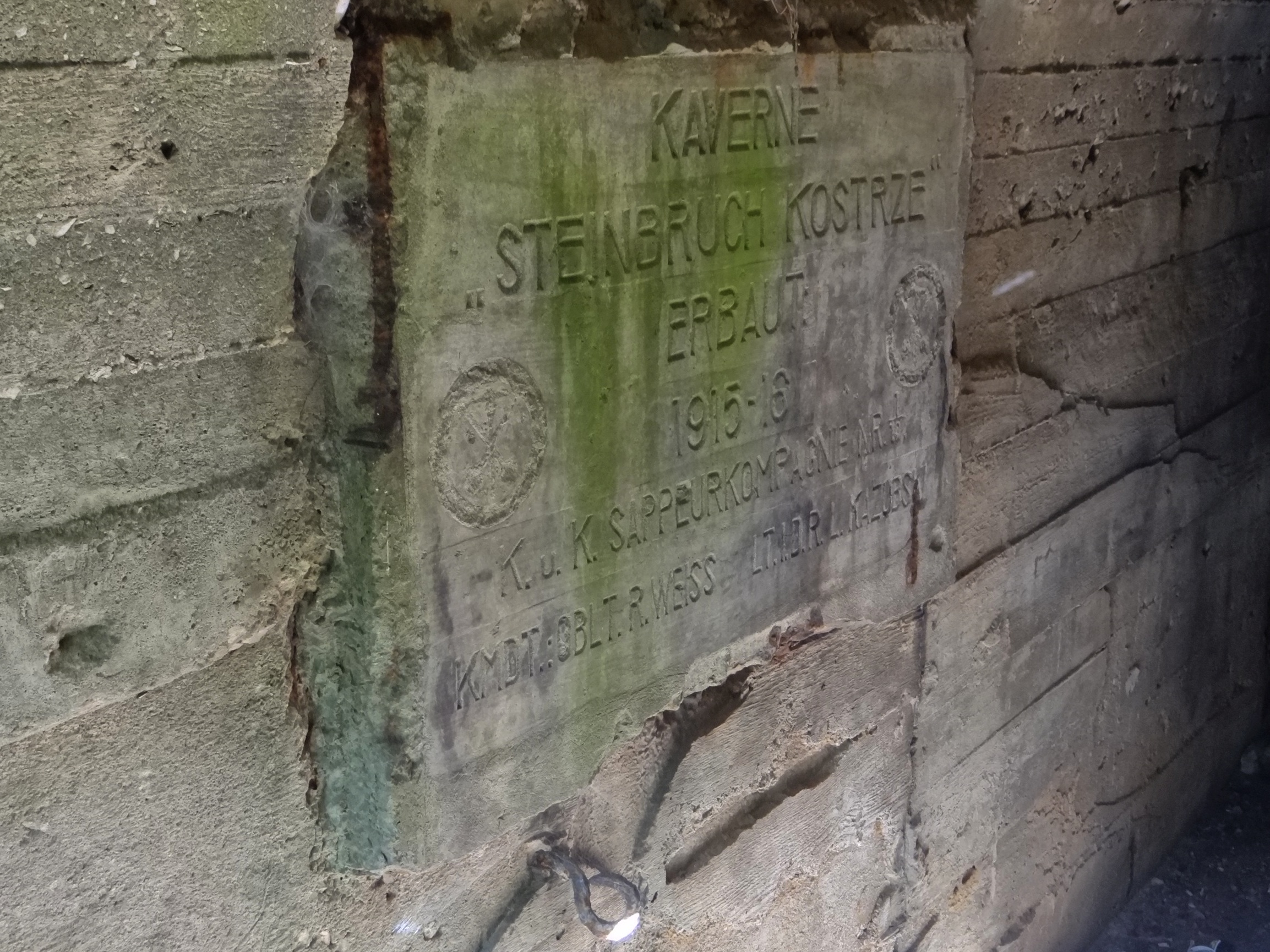 Kawerna Kostrze na wzgórzu Solnik w Krakowie